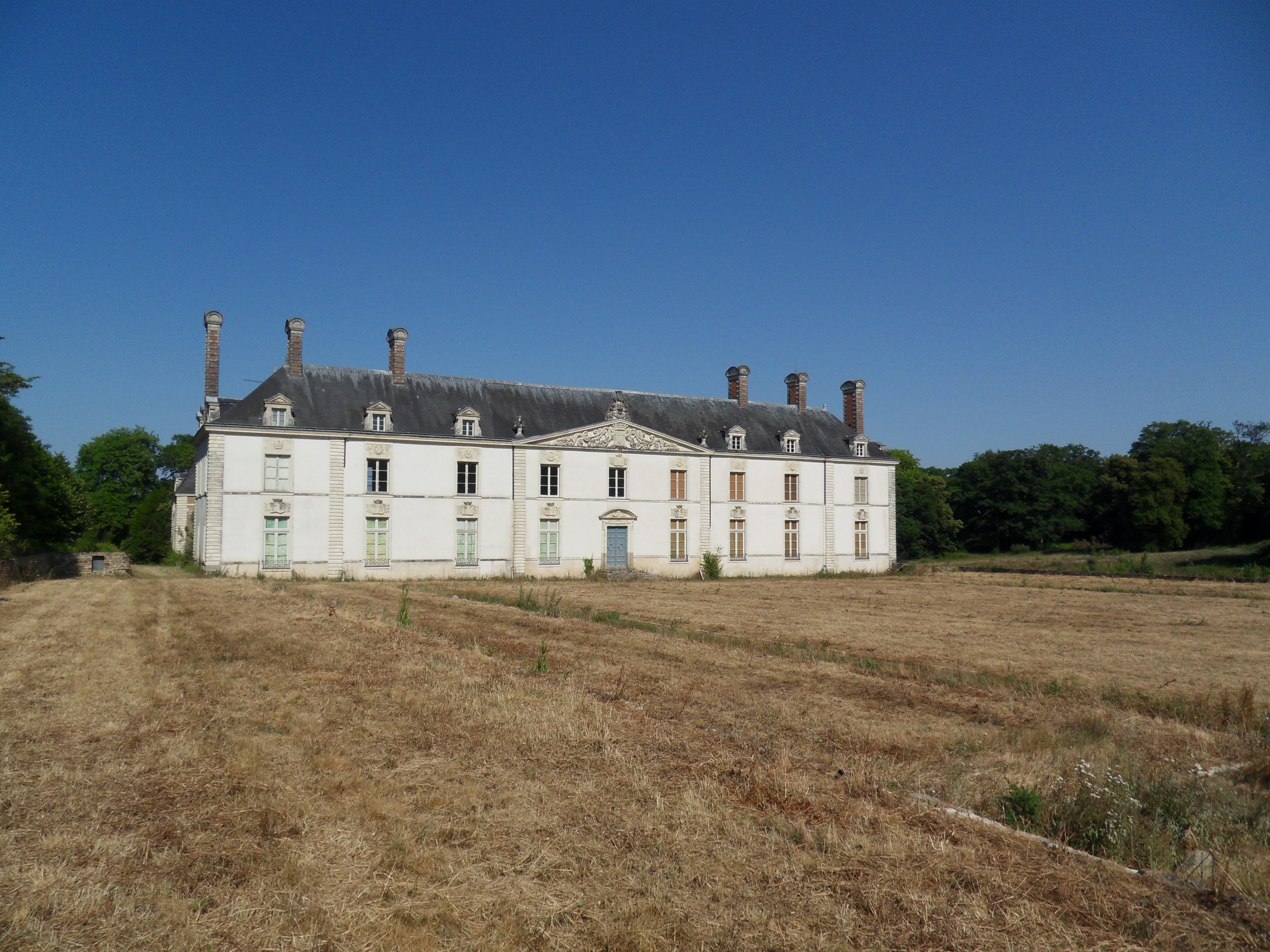 This building is en partie classé, en partie inscrit au titre des Monuments Historiques. .